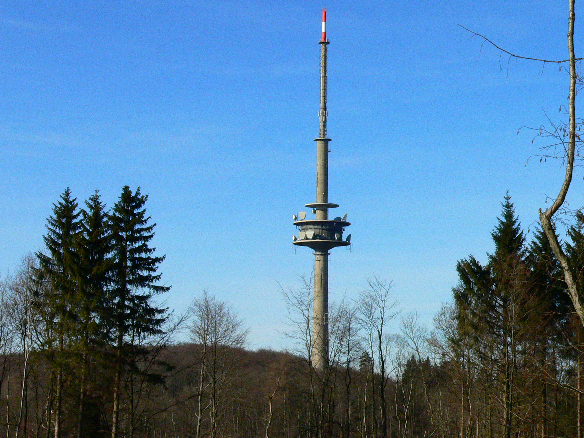 Habichtswald bei Kassel (Hessen), Fernmeldeturm